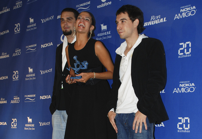 El grupo español La Quinta Estación en los Premios Nokia Amigo 2007